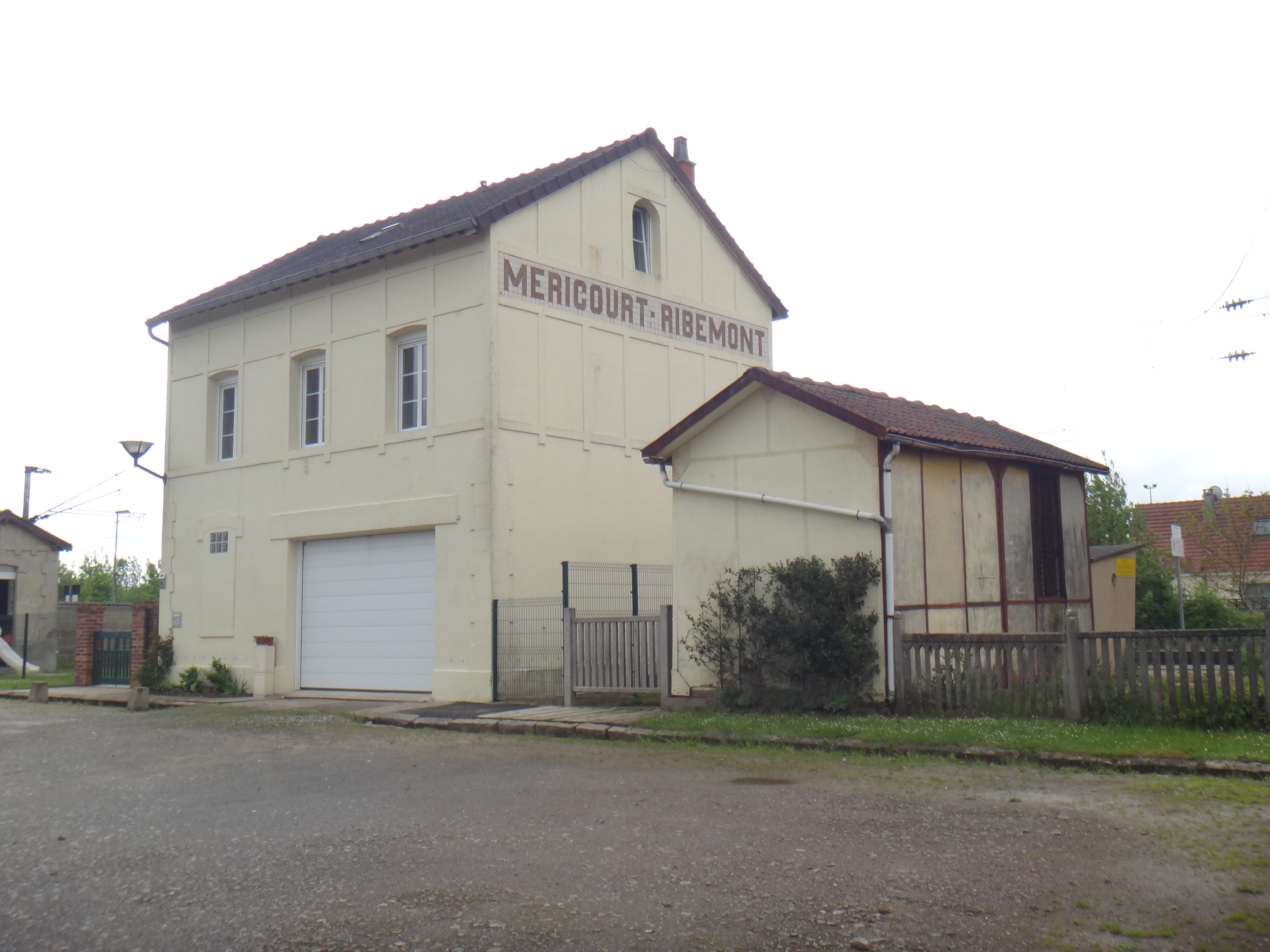 Ancien bâtiment voyageurs de la gare de Méricourt - Ribémont, Somme, Picardie, France, en mai 2014.